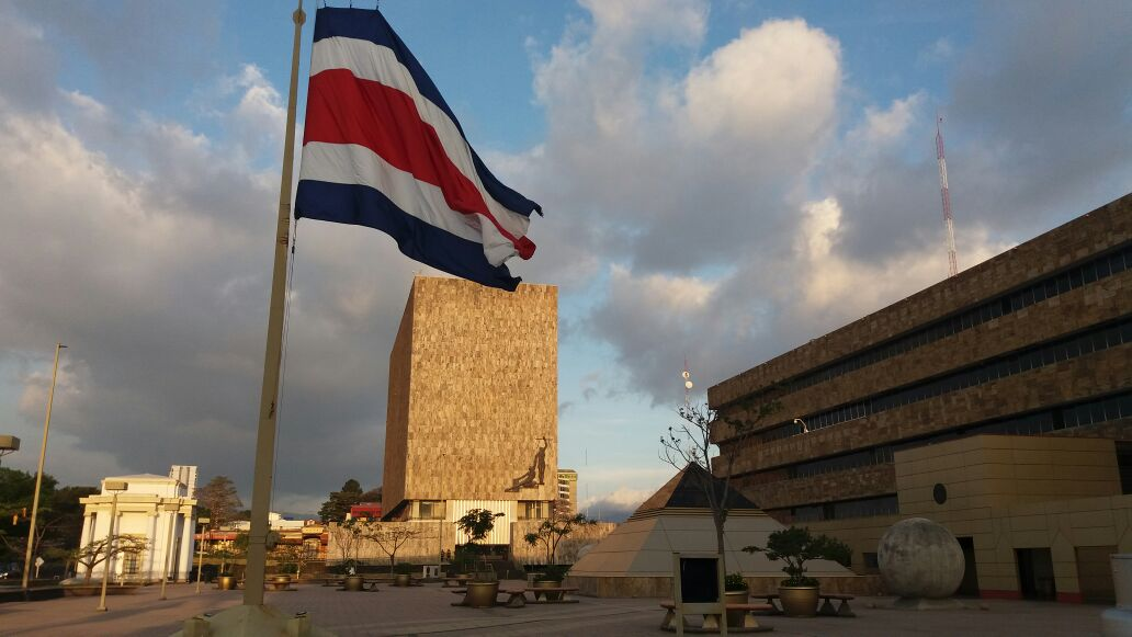 Complejo Judicial de San José: Corte Suprema, Organismo de Investigación Judicial y Plaza de la Justicia.